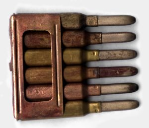 Okvirček italijanskega 6.5mm streliva, za puško Carcano M1891.